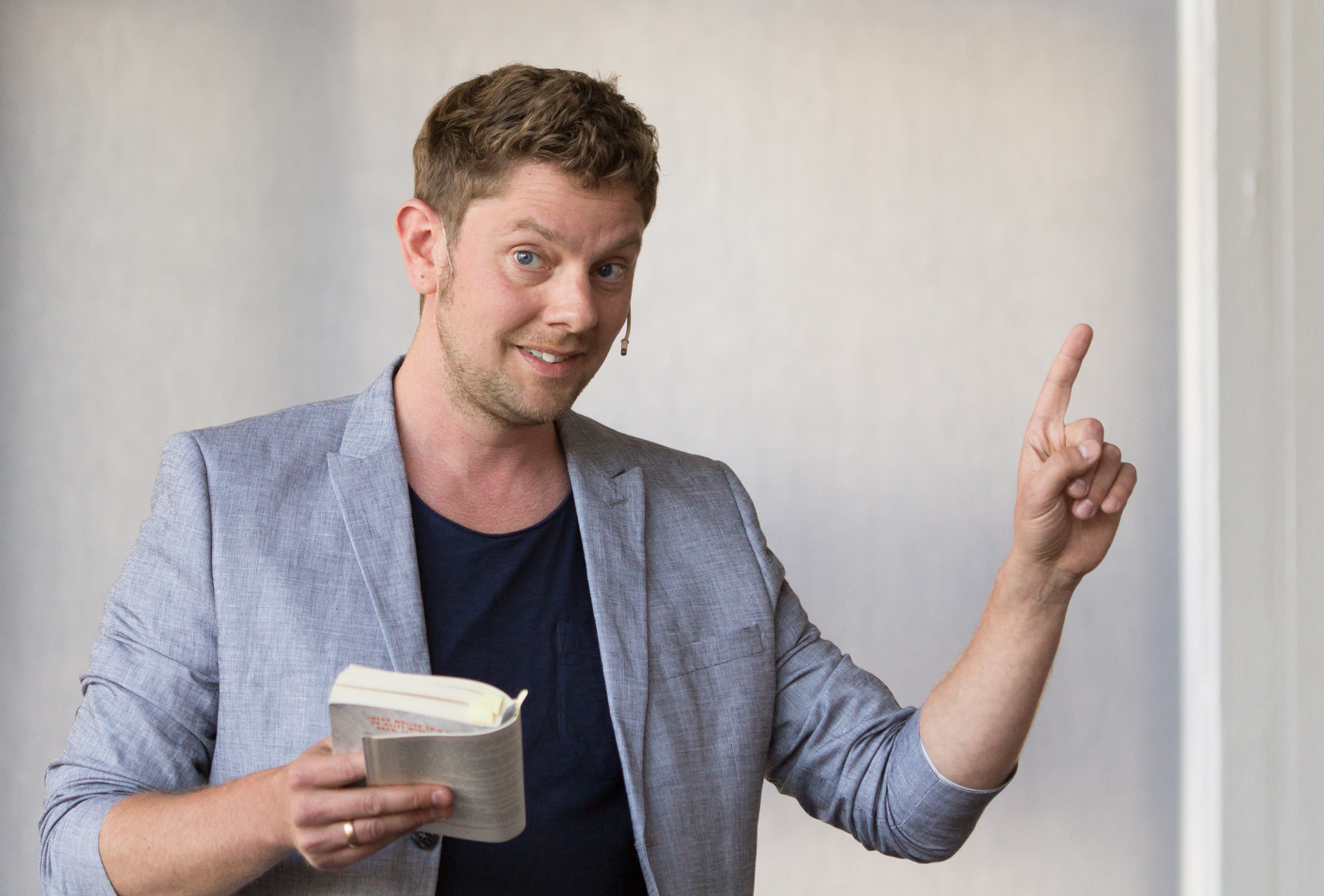 Philipp Möller, liest aus seinem Buch „Isch hab Geisterblitz“, Foyer des Bastei Lübbe Verlags während des Birlikte-Festivals in Köln-Mülheim 2015